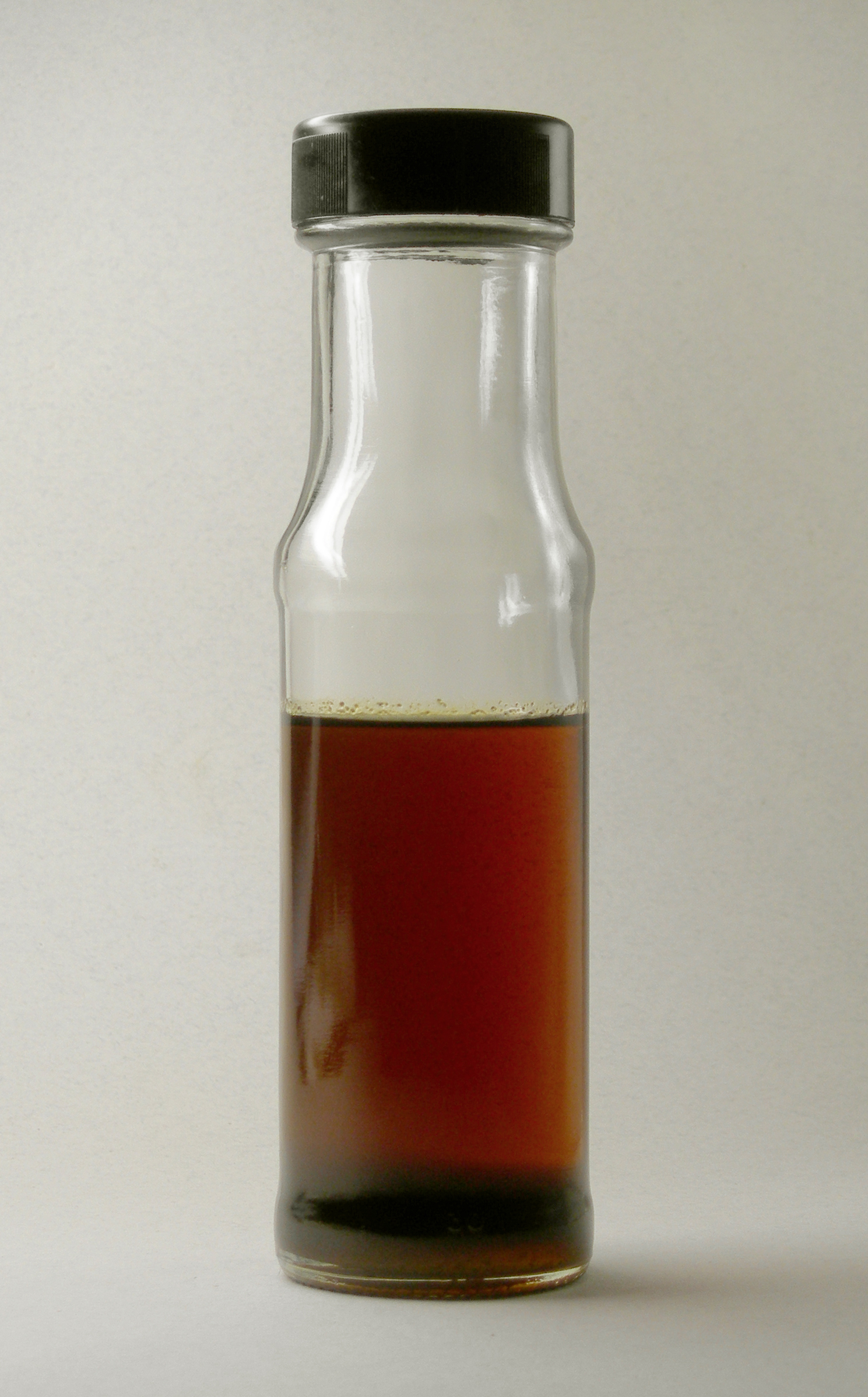 Öl aus gerösteten Sesam-Samen / Oil from roasted sesamy seed